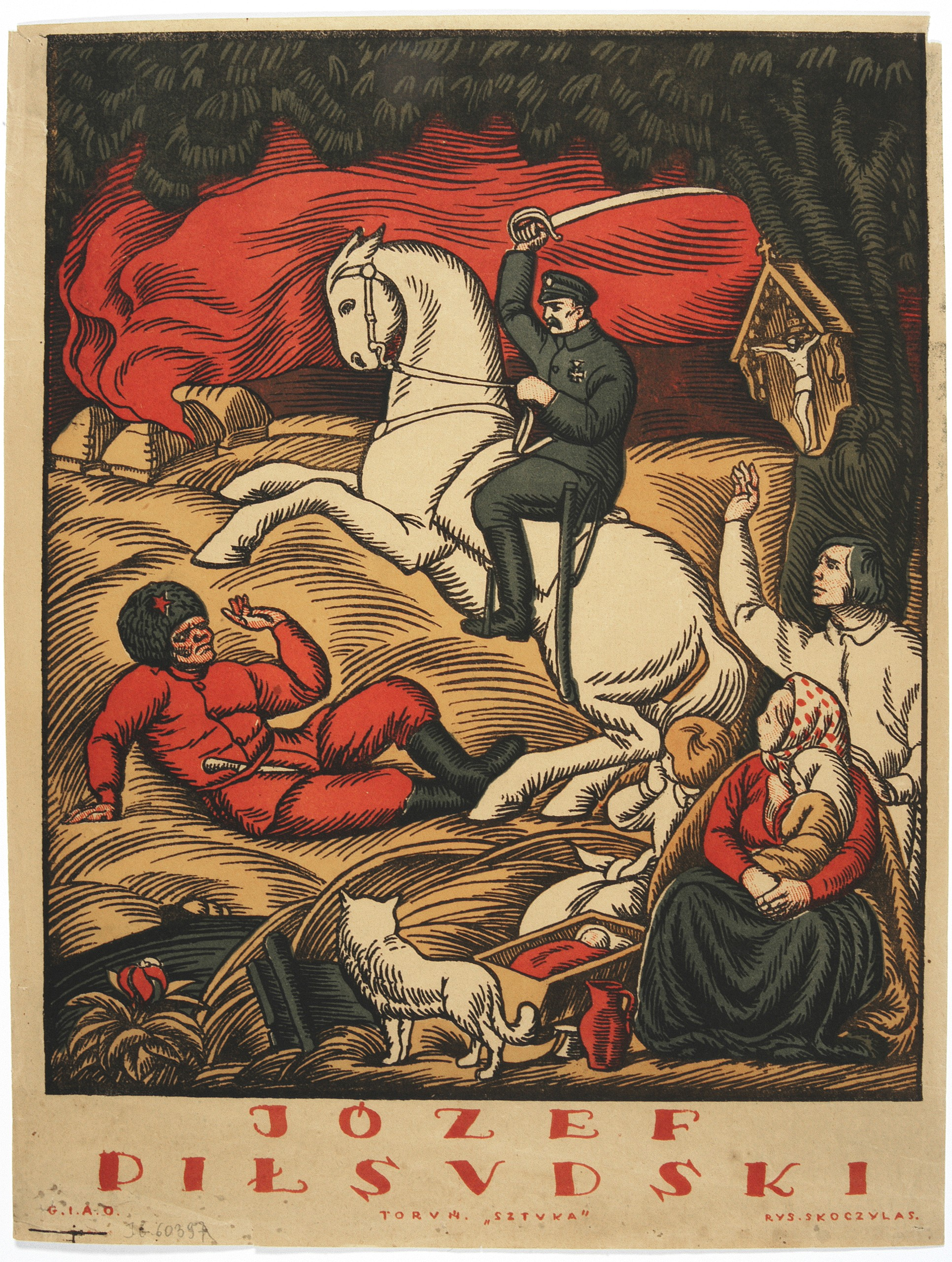 Władysław Skoczylas: Józef Piłsudski. Litografia barwna